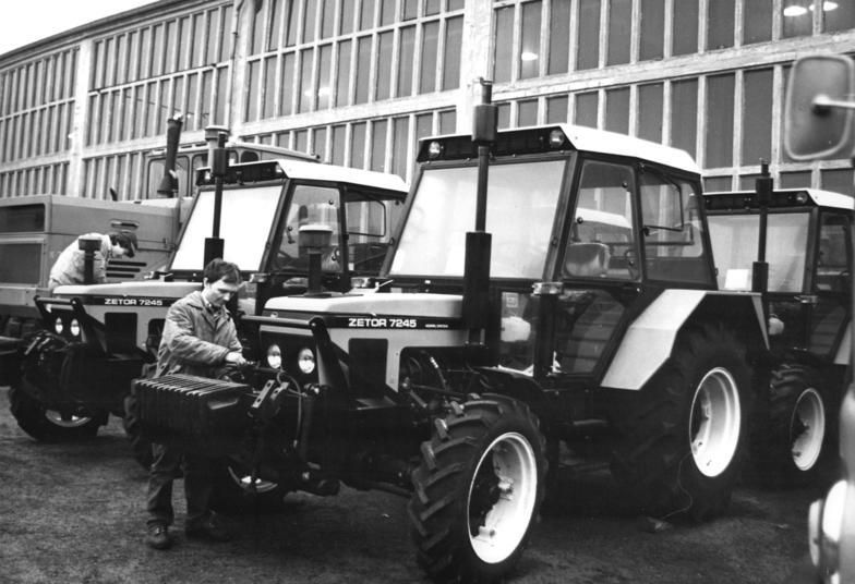 Hildburghausen, Wartung von Traktoren ADN-ZB Schaar 25.2.88 pe Bez. Suhl: Winterreparatur-Speziell für den EInsatz in Hanglagen die Maschinen ZETOR Horral 7250 geeignet, die jetzt im Kreisbetrieb für Landtechnik Hildburghausen repariert oder durchgesehen werden. Im grünland-reichsten Bezirk der DDR werden für die Futterernte mehr Aggregate zur Verfügung gestellt, die sich für Höhenlagen eignen. Im Winterreparaturprogramm ist in den fünf KfL rund die Hälfte der 1 300 Pflüge, Drillmaschinen und Pflanzenschutzgeräte aus 16 Genossenschaften und VEG geprüft bzw. repariert worden.